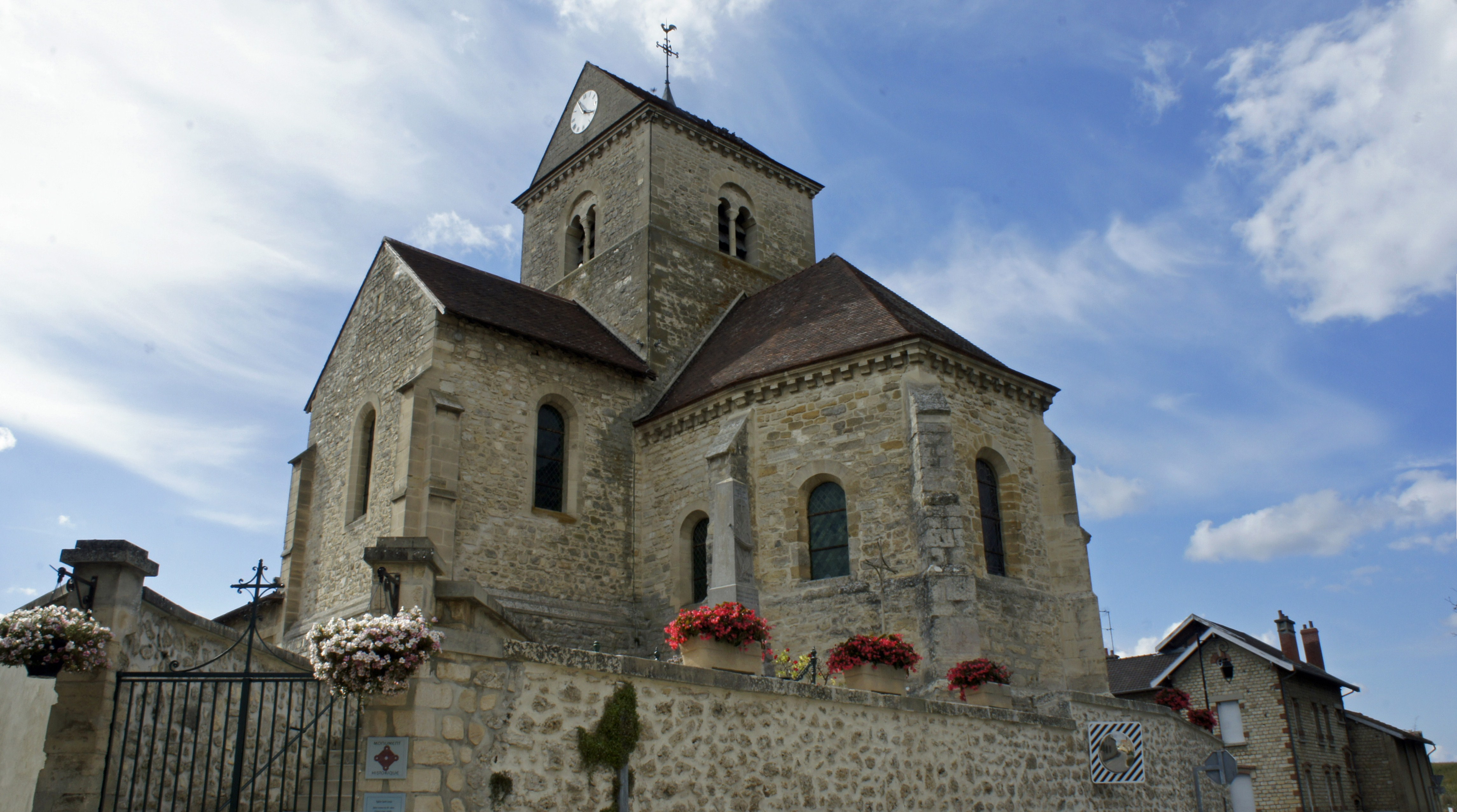 Vue de l'église St-Loup de Thillois.